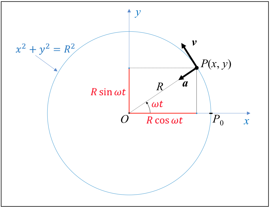 Higidura zirkular uniformeko magnitude zinematikoen eskema planoko koordenatu kartesiarretan.